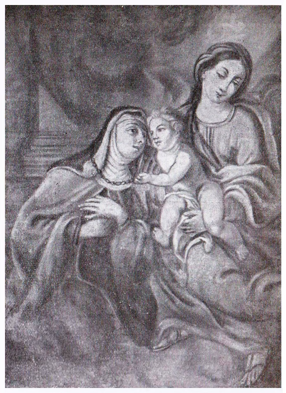 Affresco raffigurante la Madonna con il Bambino e la beata Giuliana, opera di Biagio Bellotti originariamente collocato presso il cortile della chiesa di Santa Croce a Busto Arsizio, demolita nel 1972. L'affresco è andato perso.